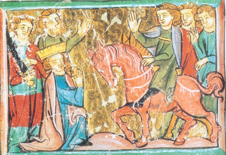 Angeblicher Fußfall Barbarossas vor Heinrich dem Löwen in Chiavenna 1176, Sächsische Weltchronik (spätes 13. Jahrhundert). Ob es tatsächlich zu einem Fußfall des Kaiser kam, ist umstritten, da nur spätere Quellen, und diese z. T. unterschiedlich, davon berichten. (Staats- und Universitätsbibliothek Bremen)